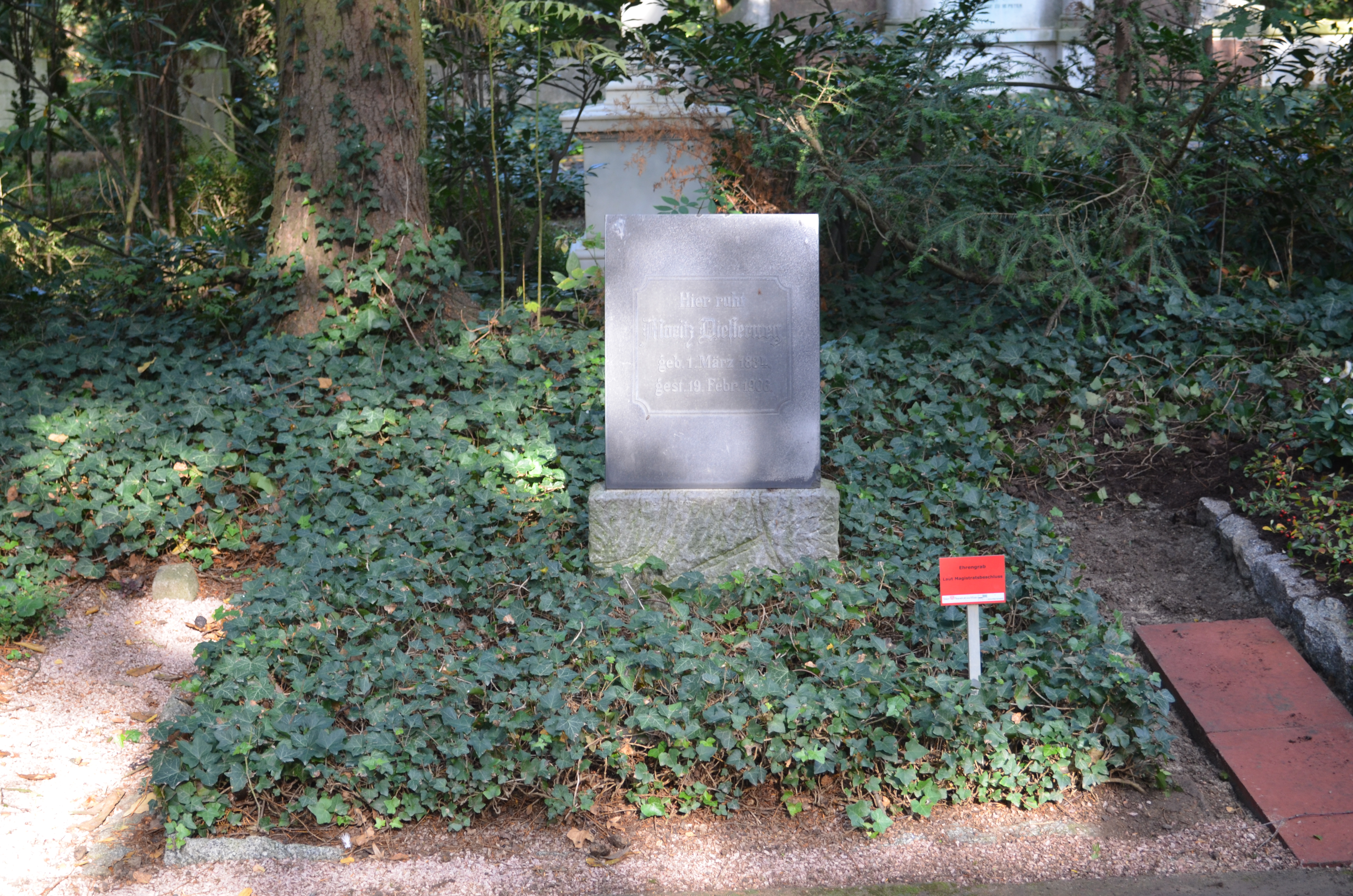 Frankfurt, Hauptfriedhof, Ehrengrab A 297 Moritz Diesterweg